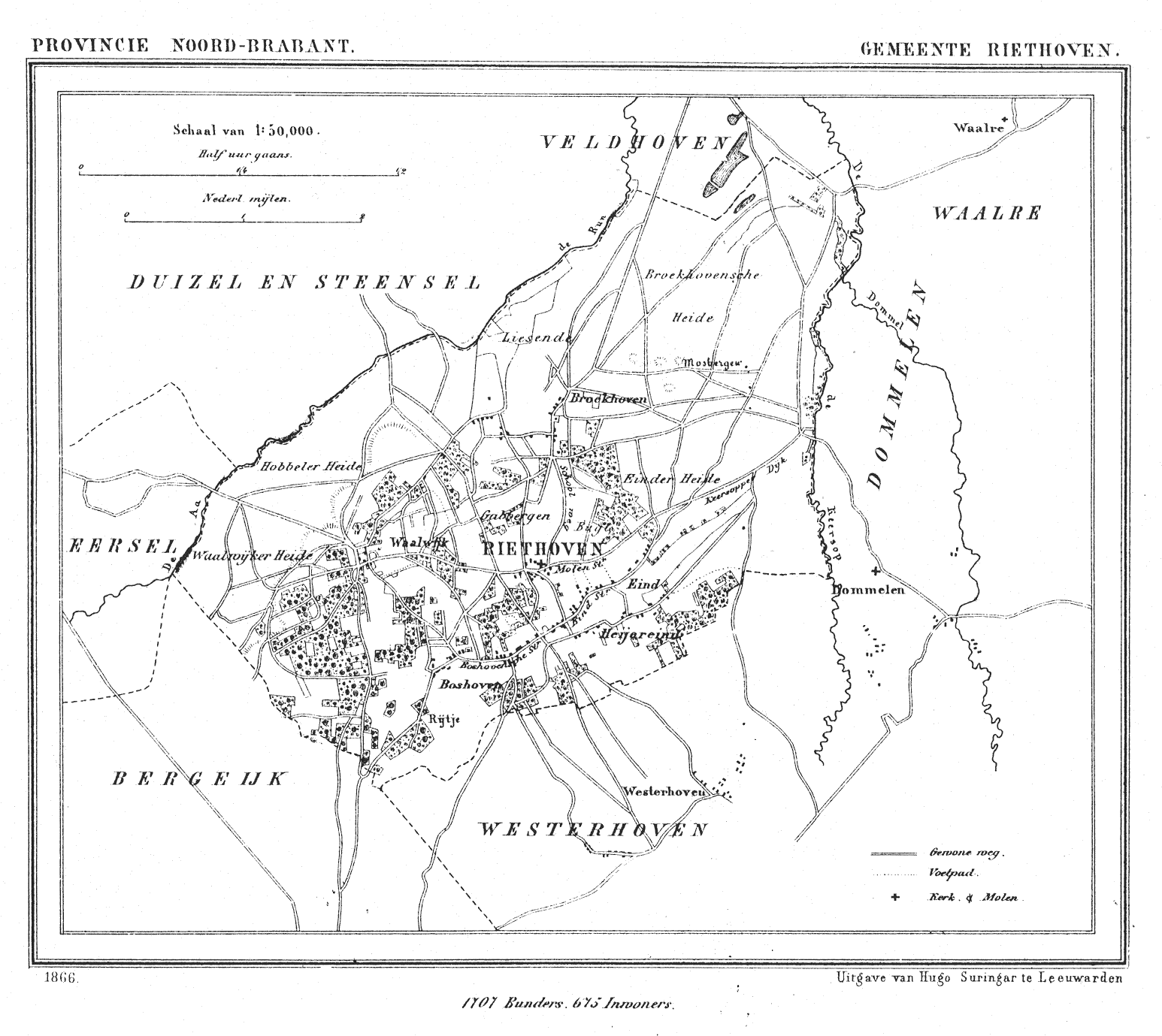 Nederland, Noord-Brabant, Gemeente Riethoven